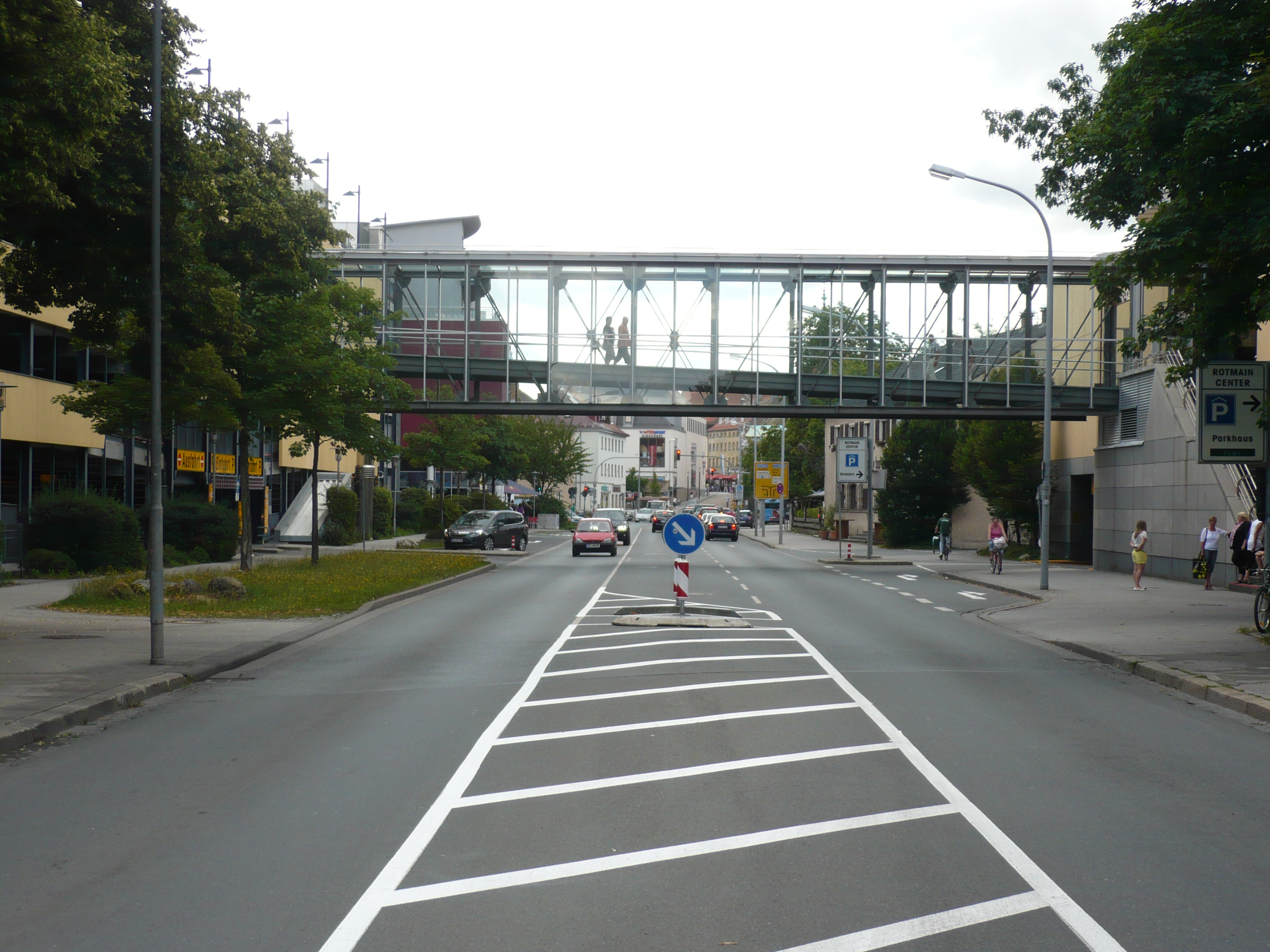 Hindenburgstraße Bayreuth